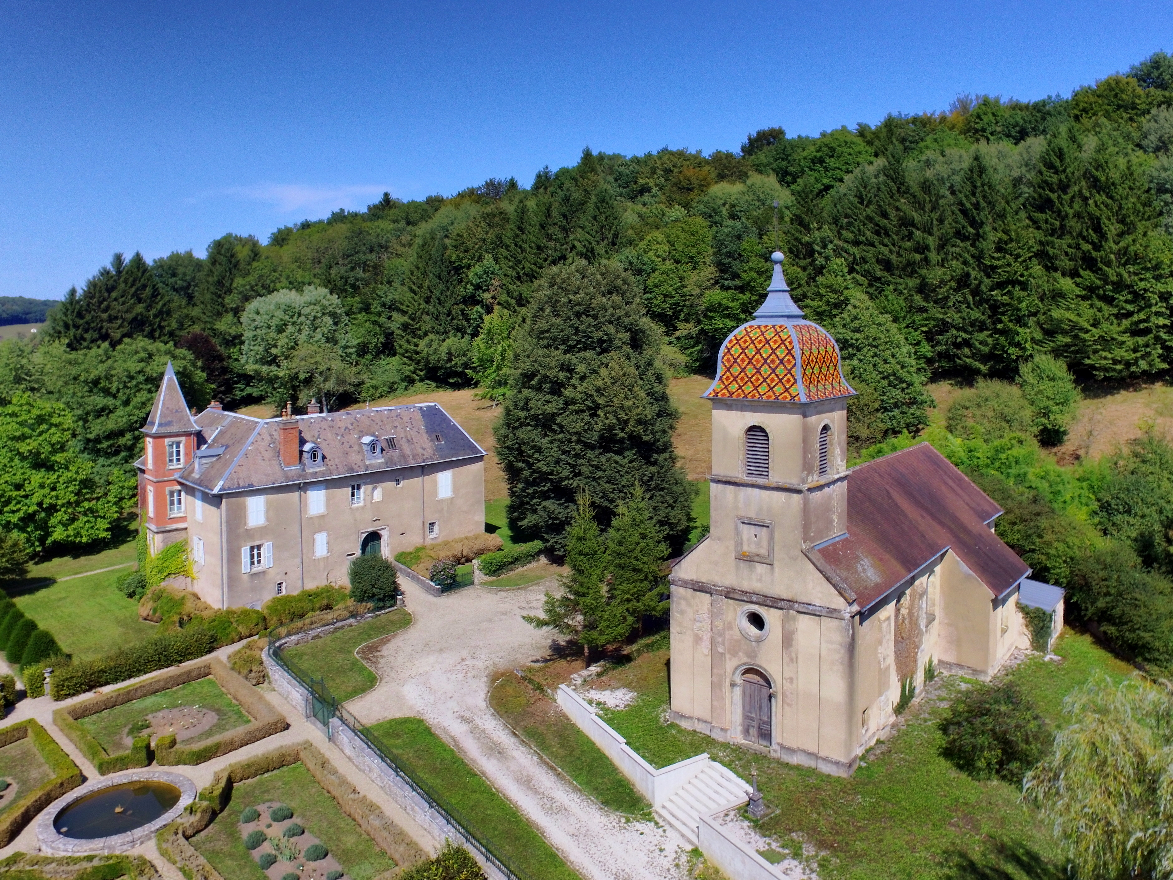 L'église et le château